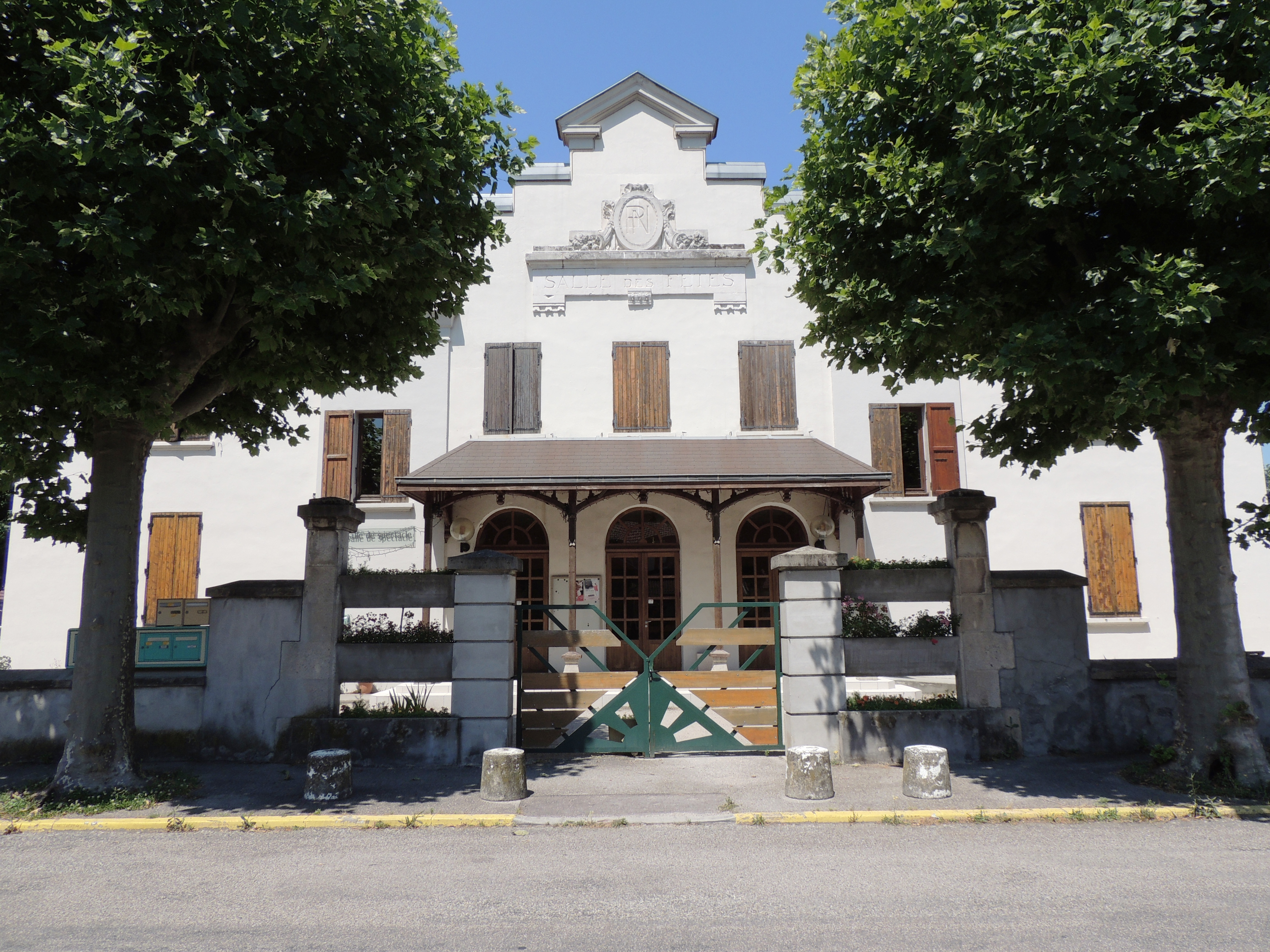 Entrée de la salle Navarre au Complexe socio-culturel de Champ-sur-Drac.